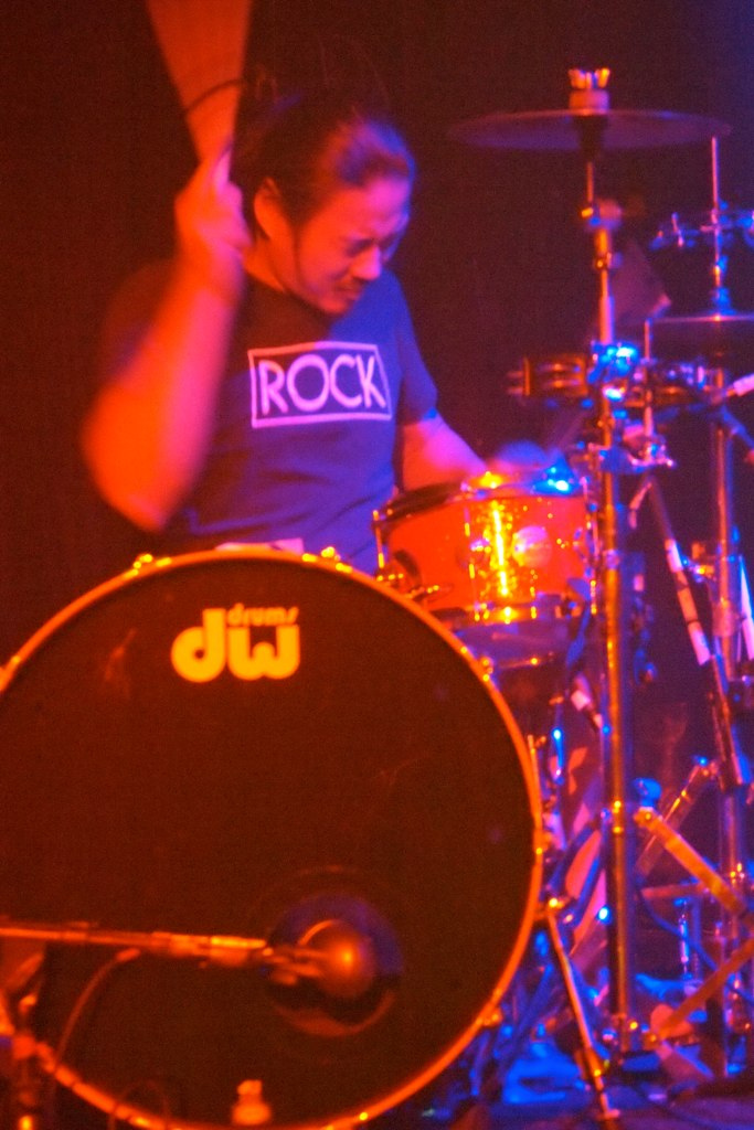 Miyavi @ Irving Plaza 10/31/11 - 061